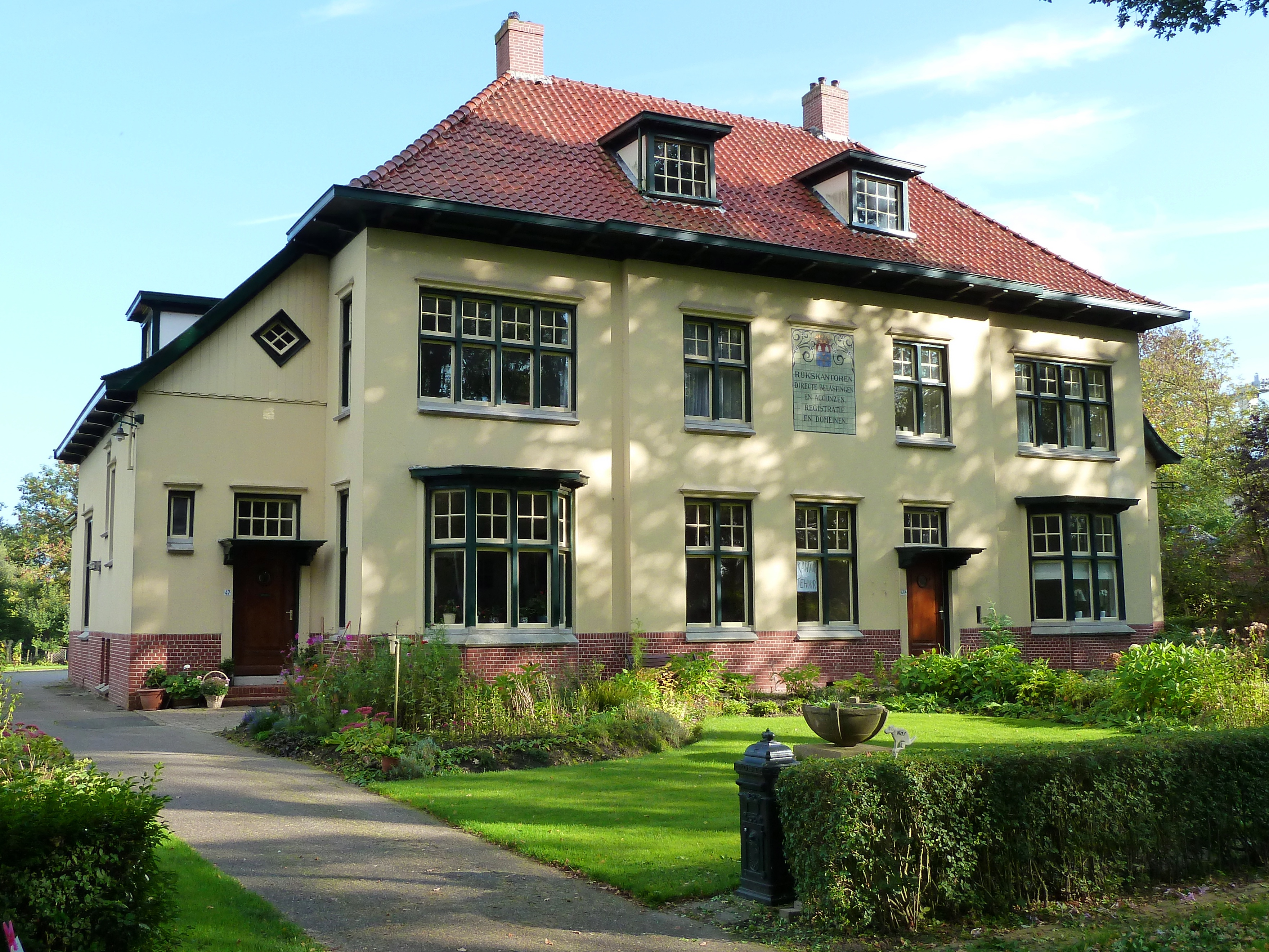 Voormalig belastingkantoor aan de Hoofdstraat 45, 45a en 47 (huisnummers anno 2010) van Zuidhorn. Aan linkerzijde bevond zich de inspecteurswoning en aan rechterzijde een rentmeesterswoning (beiden symetrisch aangebouwd). Gebouwd in 1919 in interbellum-architectuur in opdracht van de rijksgebouwendienst naar een ontwerp van Klaas Siekman. Het werd verbouwd in 1956 (aanbouw dakkapel achterzijde) en 1958 (aanbouw berging). Sinds 1976 zetelt de belastingdienst niet meer in het gebouw.